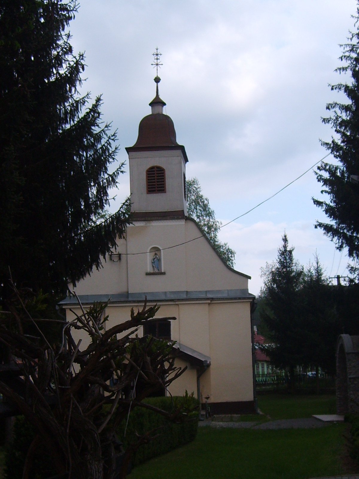 Domaházi római katolikus templom